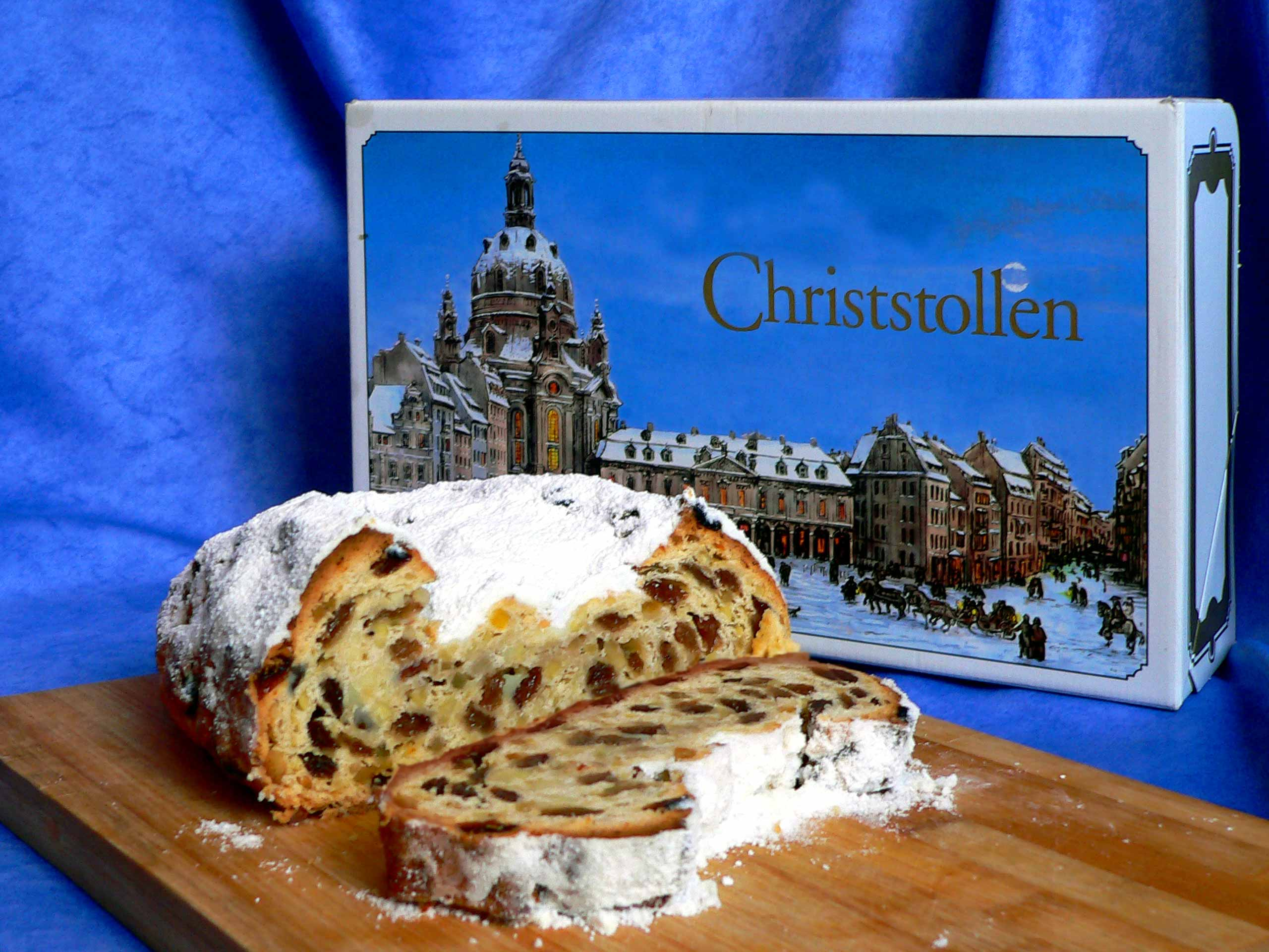 Stollen-Dresdner Christstollen